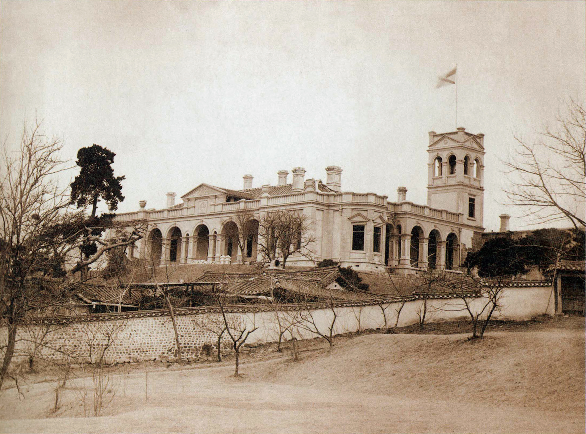 Здание Русской духовной миссии в Сеуле